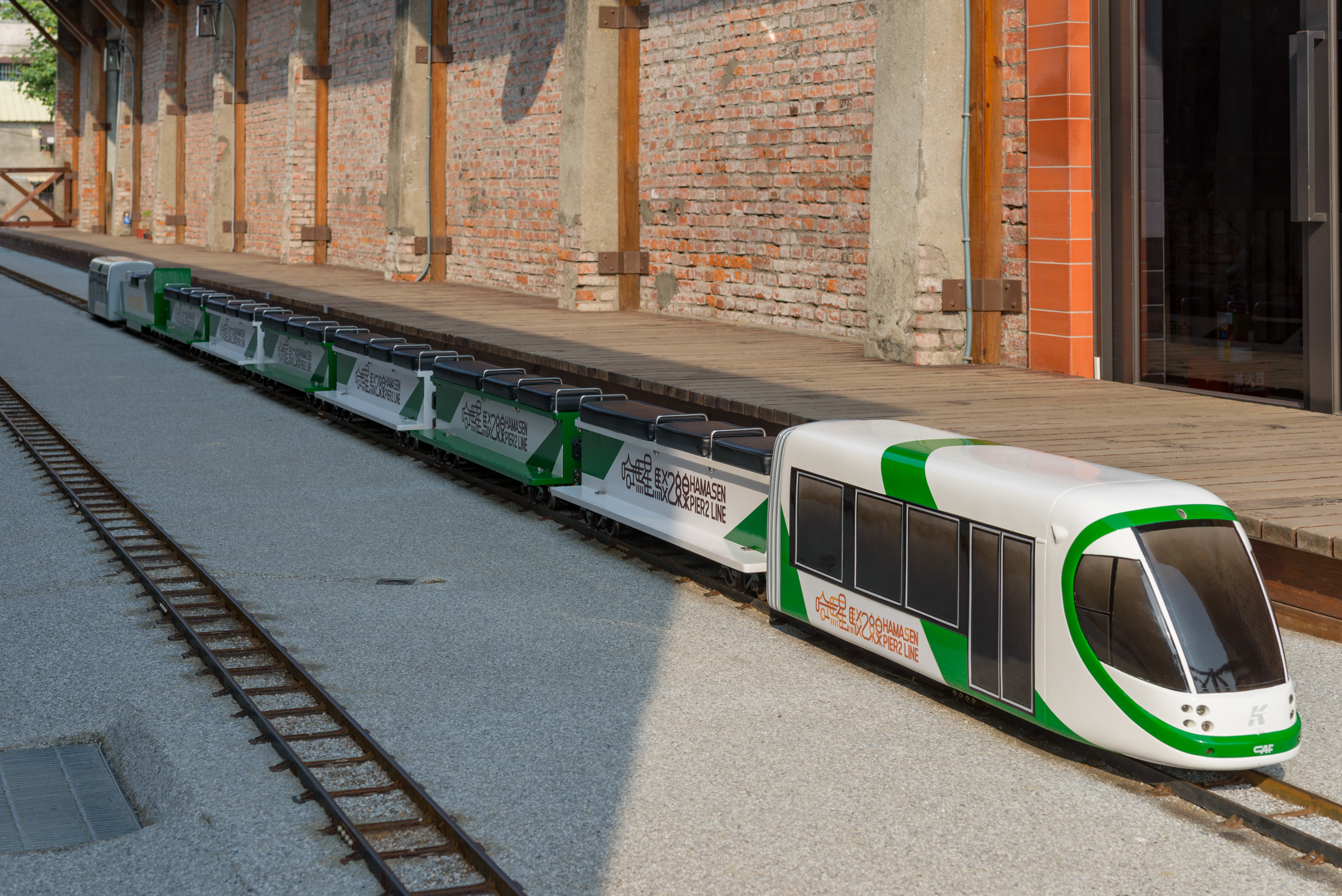 51505-Kaohshiung